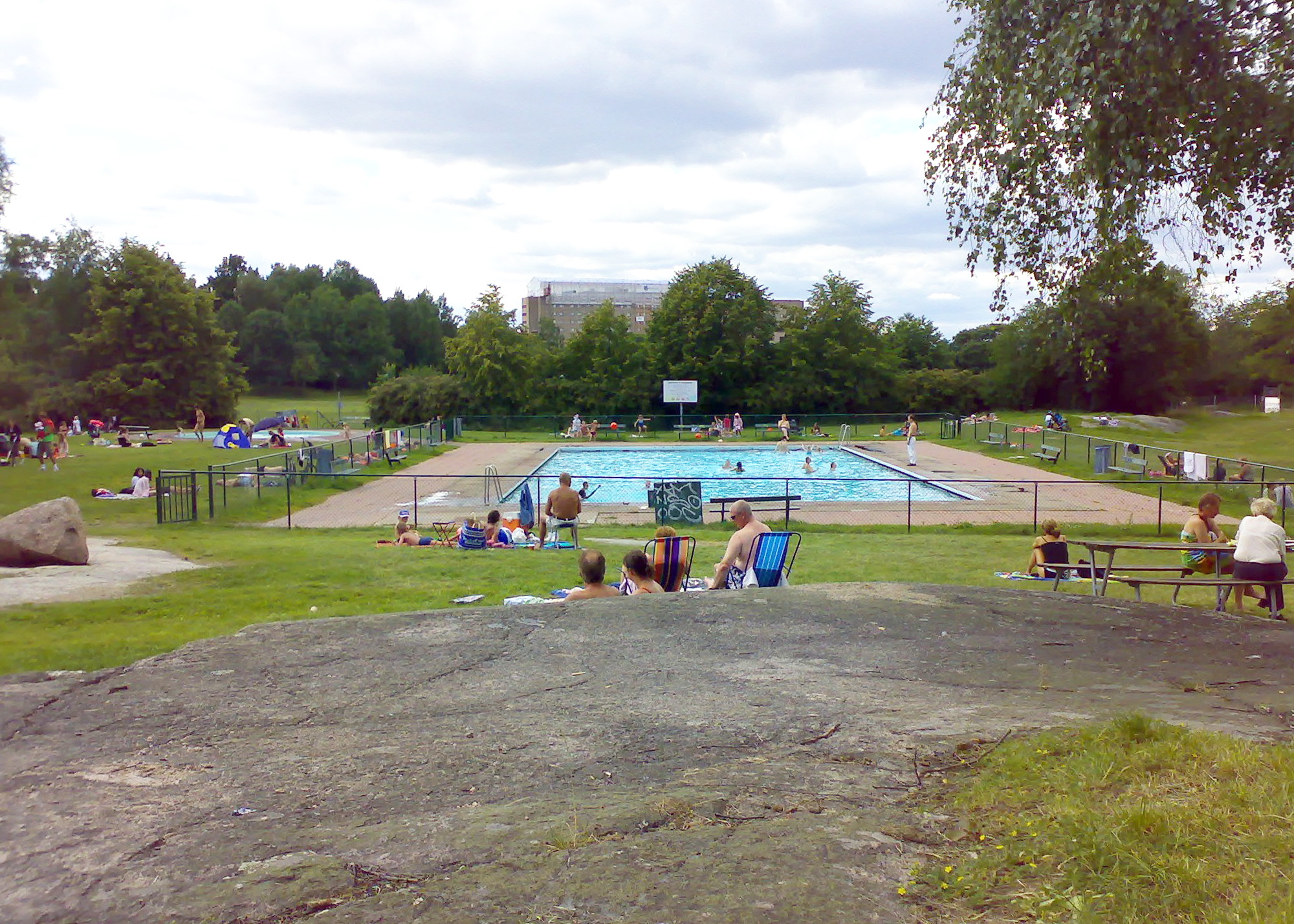 Nytorpsbadet